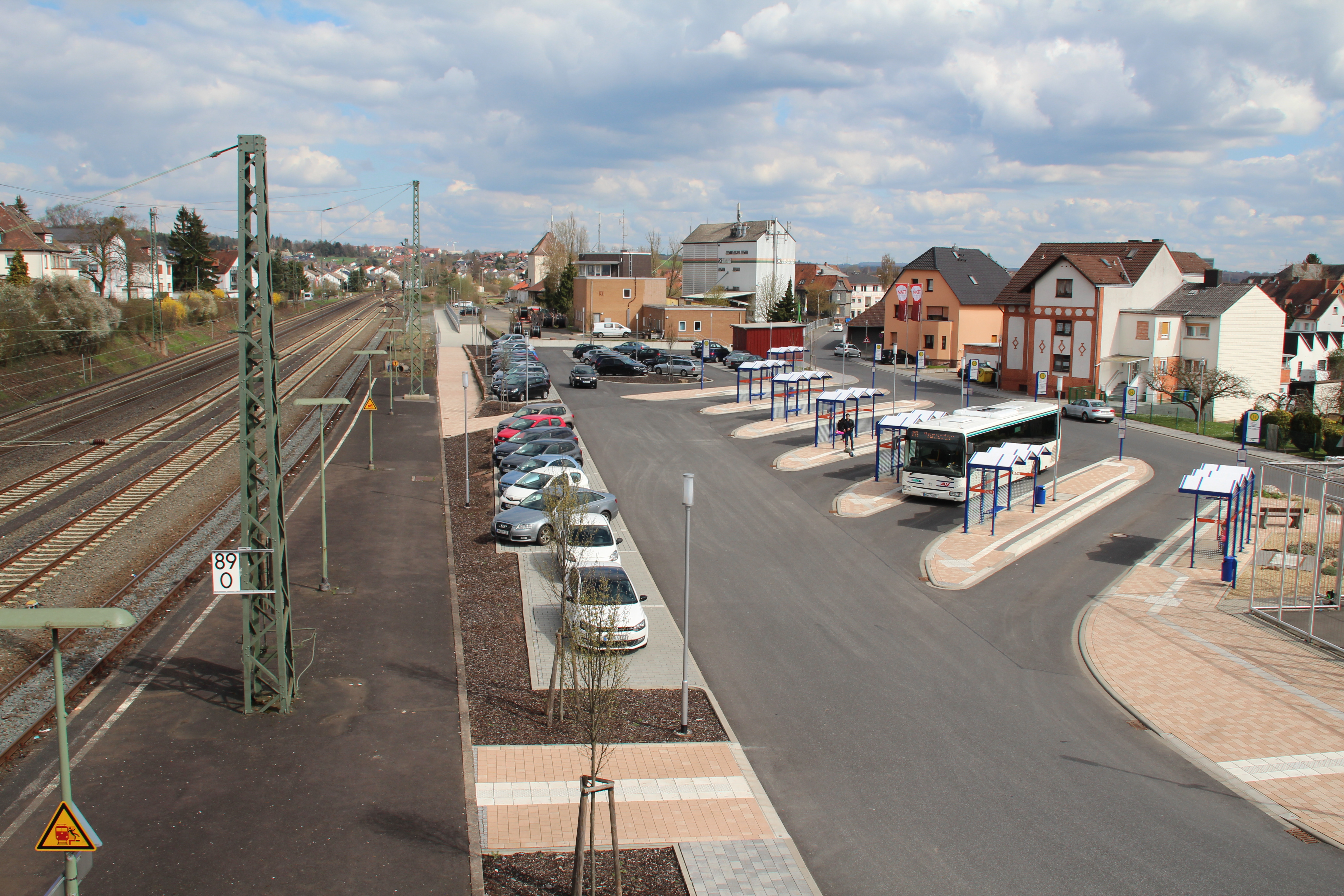 Übersicht über den neuen Busbahnhof auf dem Gelände des ehemaligen Güterschuppens und der Ladegleise des Bahnhofs Kirchhain (Bz Kassel), im Hintergrund das Stellwerk Kf und die Raiffeisen-Lagerhäuser. Links erkennbar der alte Bahnsteig an Gleis 5, an dessen ehemaliger rechter Kante das Bahnsteiggleis 7 lag, noch weiter rechts neben diesem lagen die Gleise 9 und 10 (Gleis 8 gab es offensichtlich nicht), letzteres an der Rampe des ehemaligen Güterschuppens, der in etwa dort stand, wo die Bushaltestellen zu erkennen sind.